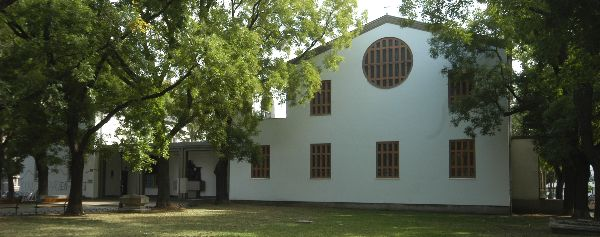 Die Christkönigskirche in Rudolfsheim-Fünfhaus